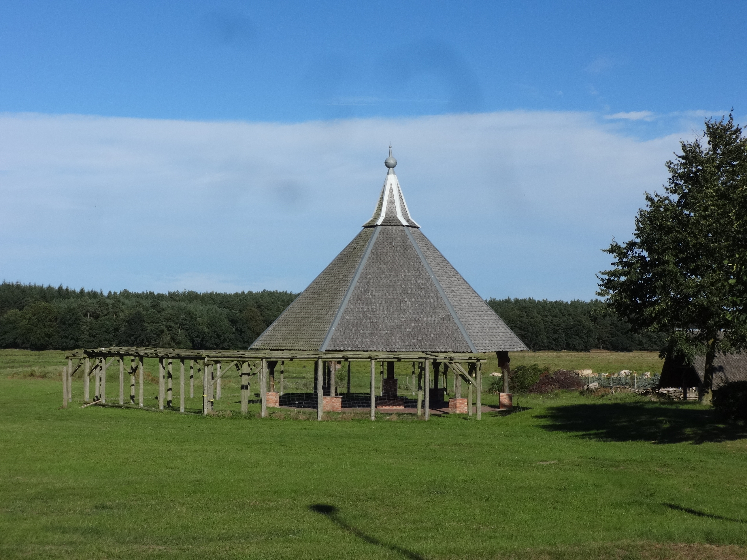 Dorfplatz mit Backofen in Buddenhagen (Wolgast), Vorpommern-Greifswald